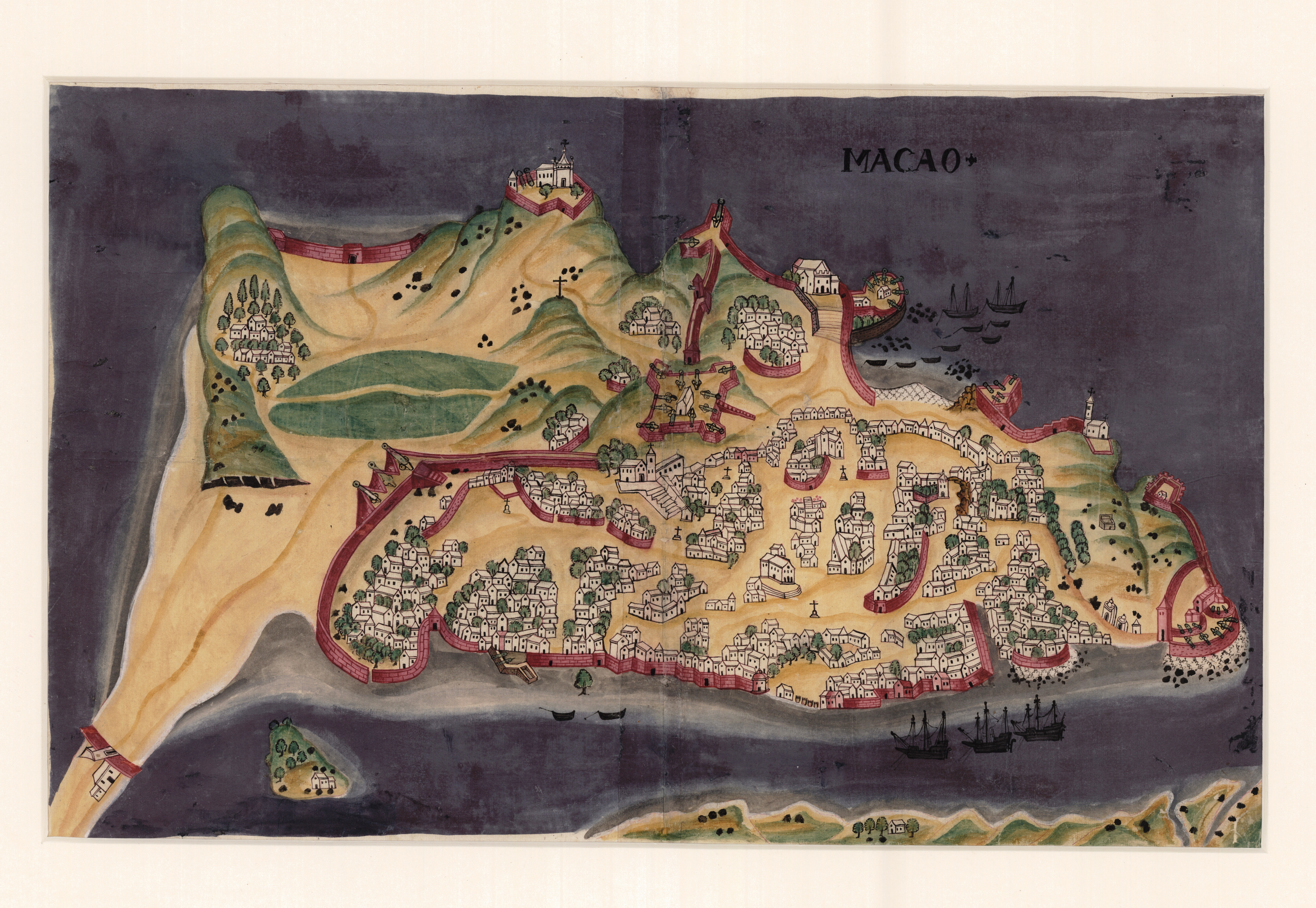 Planta de Macau in BOCARRO, António. Livro das Plantas de todas as fortalezas, cidades e povoaçoens do Estado da Índia Oriental. 1635.